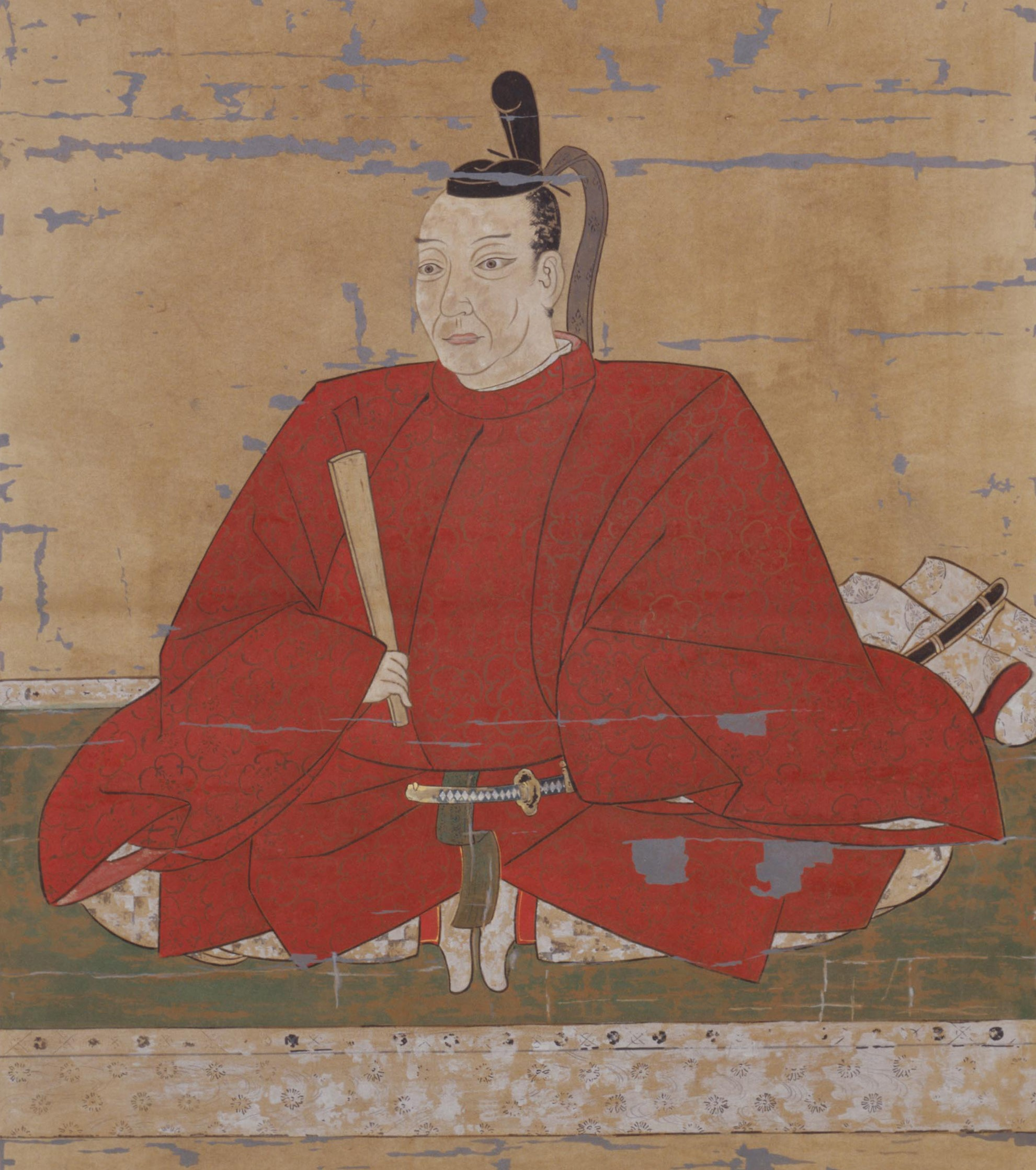 金森可重の肖像。